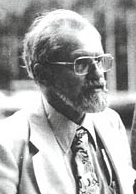 Dr. J. Allen Hynek (left) and Dr. Jacques Vallée (right).